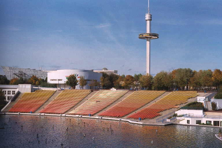 Futuroscope France 2001